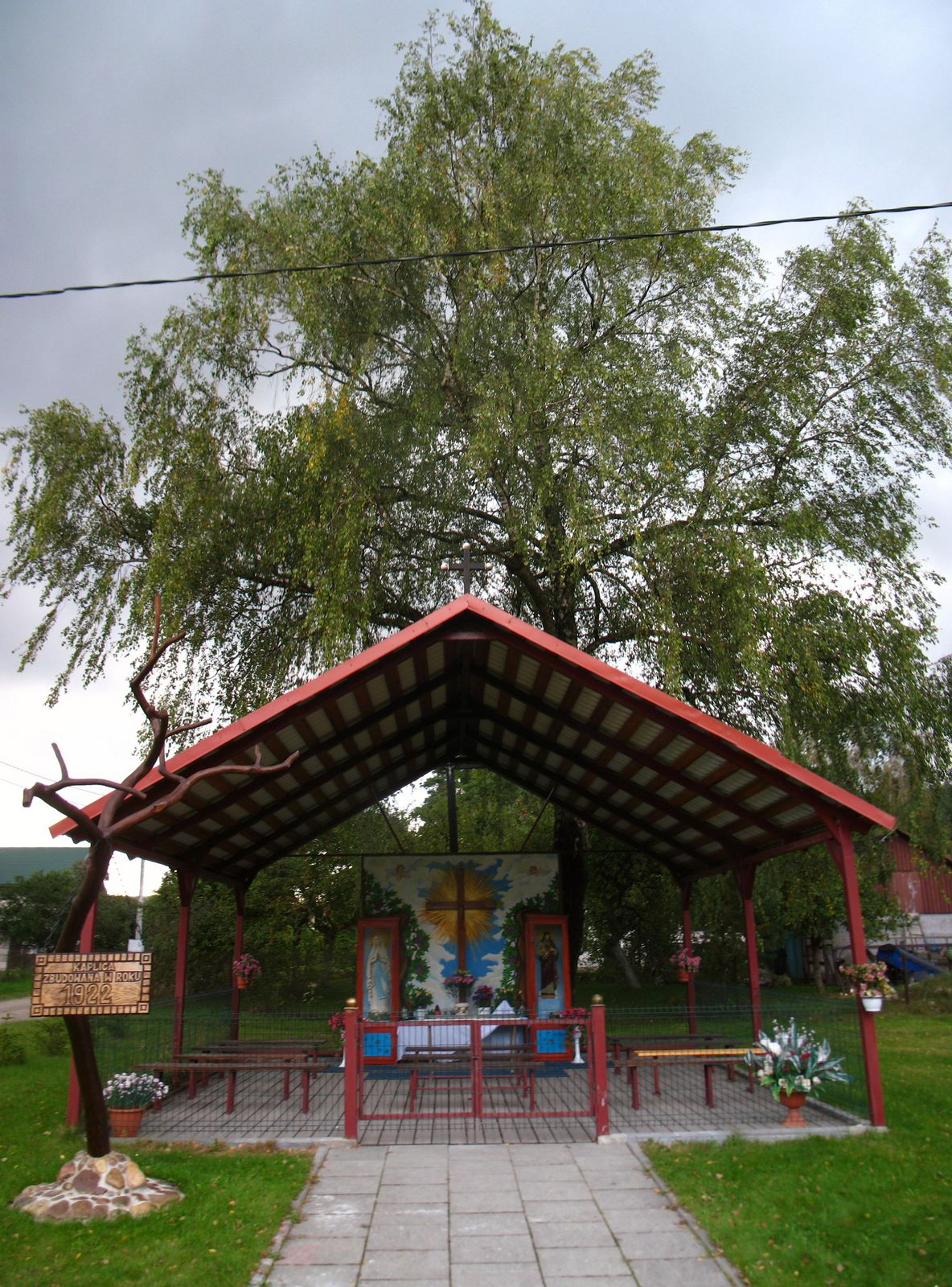 Капліца ў Засьценках (Užusieniai, Zaścianki)